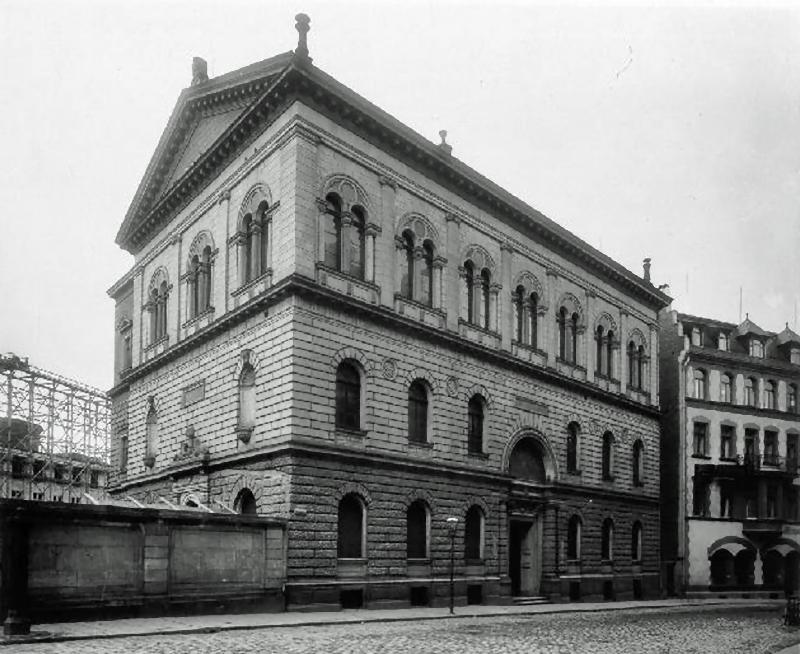 Das Logenhaus der Freimaurerloge Minerva zu den drei Palmen in Leipzig, Schulstraße 1, nach dem Neuaufbau 1884–1886 von Max Bösenberg, im Hintergrund die Gerüste für das Neue Rathaus